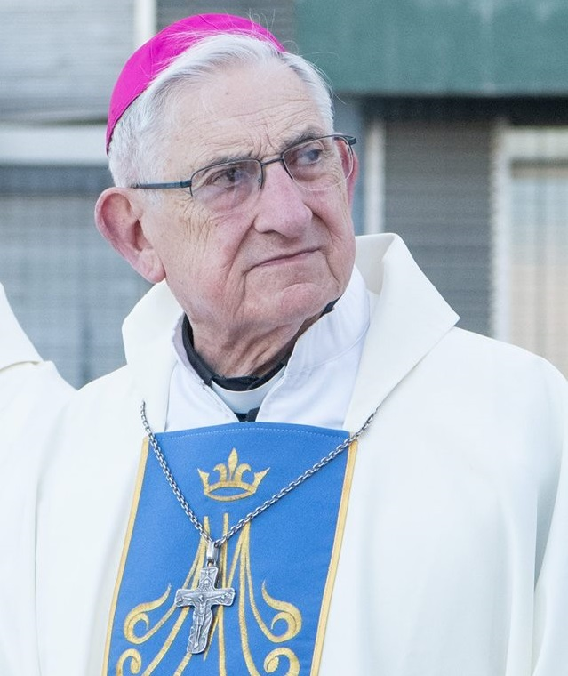 Mons. Eduardo Mirás, Arzobispo emérito de Rosario